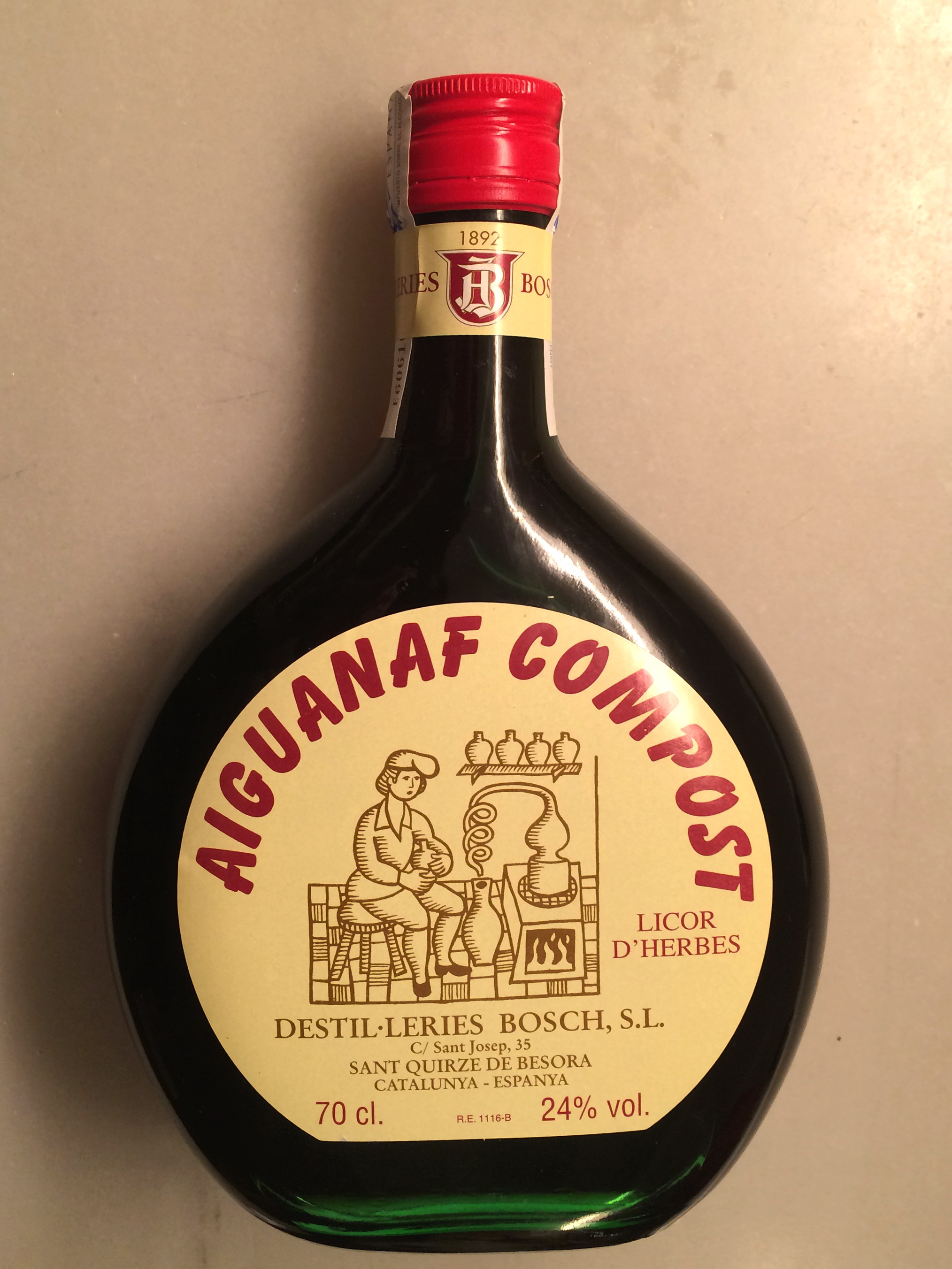 Ampolla d'Aiguanaf Compost. L'aiguanaf és aigua aromàtica destil·lada obtinguda a partir de flors de taronger. L'aiguanaf compost és una barreja amb vi ranci.